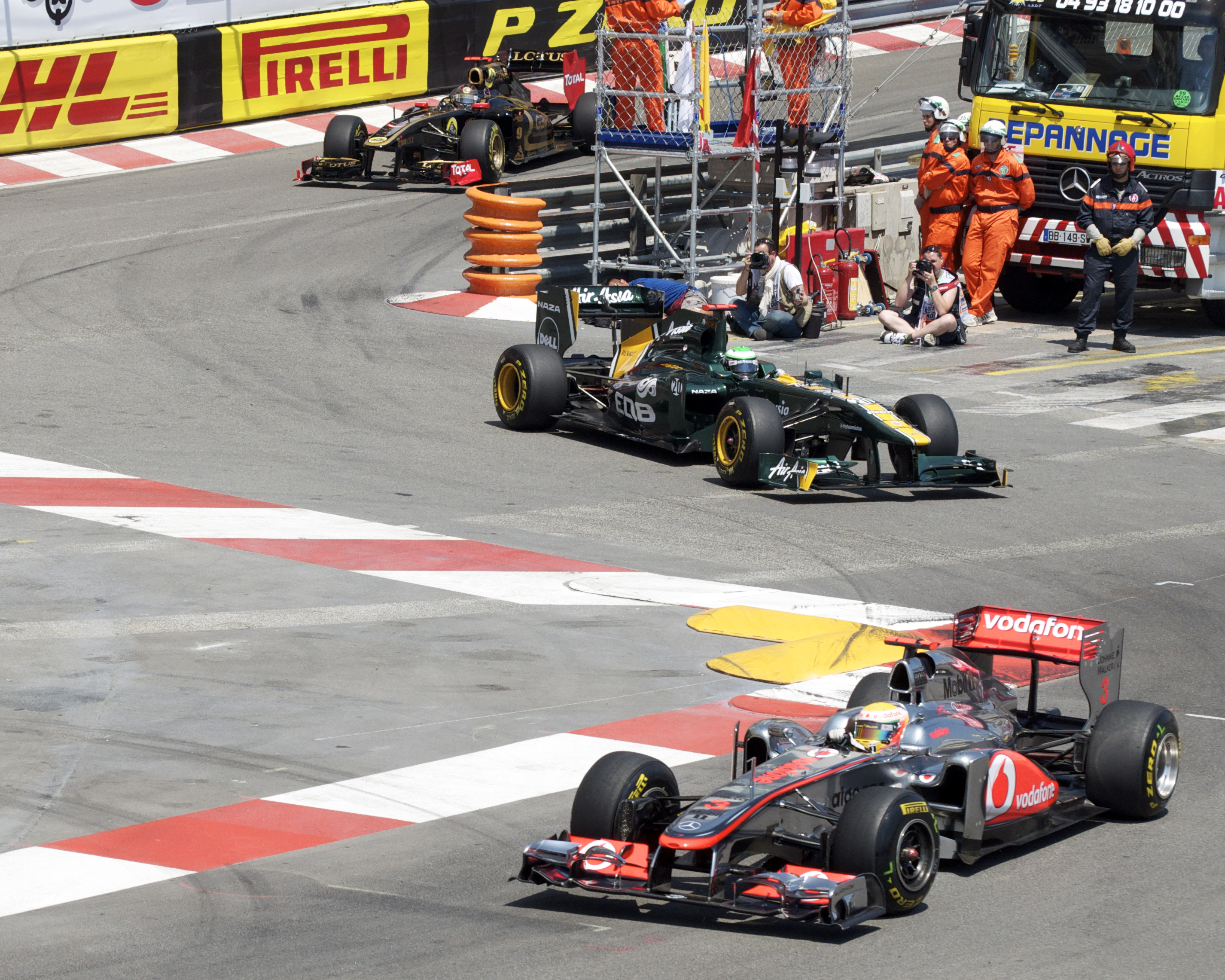 2011 Monaco GP